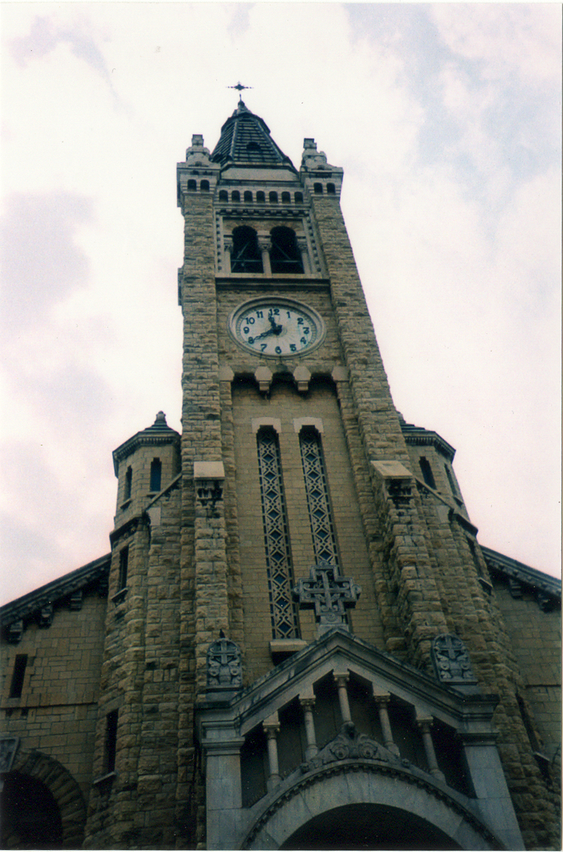 Torino, Chiesa di santa Rita: la torre campanaria.